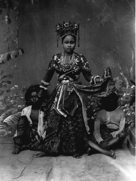 Foto. Een ronggeng danseres te Batavia